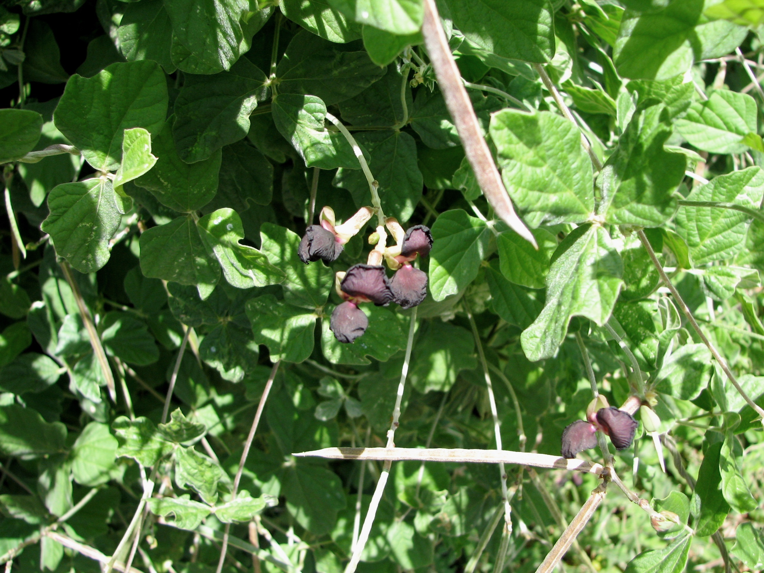 Macroptilium atropurpureum